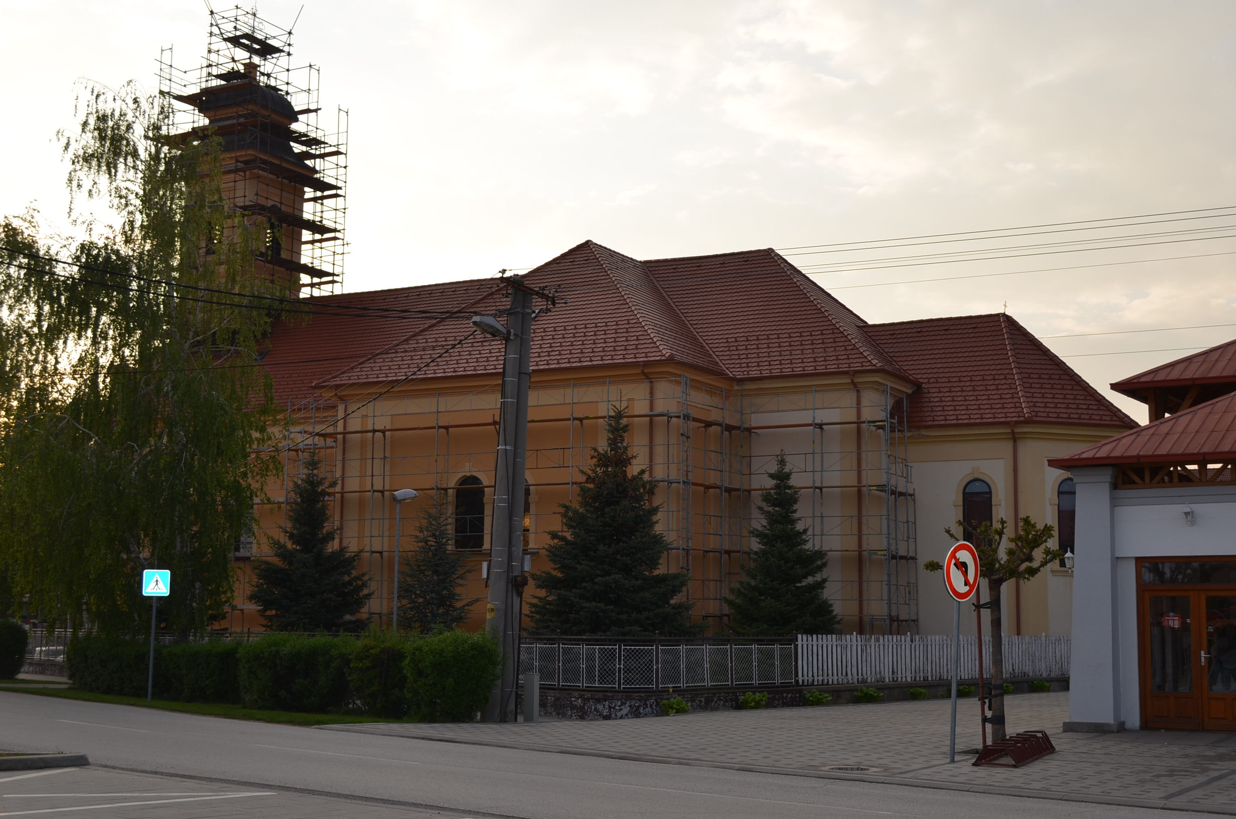 Nagymácséd